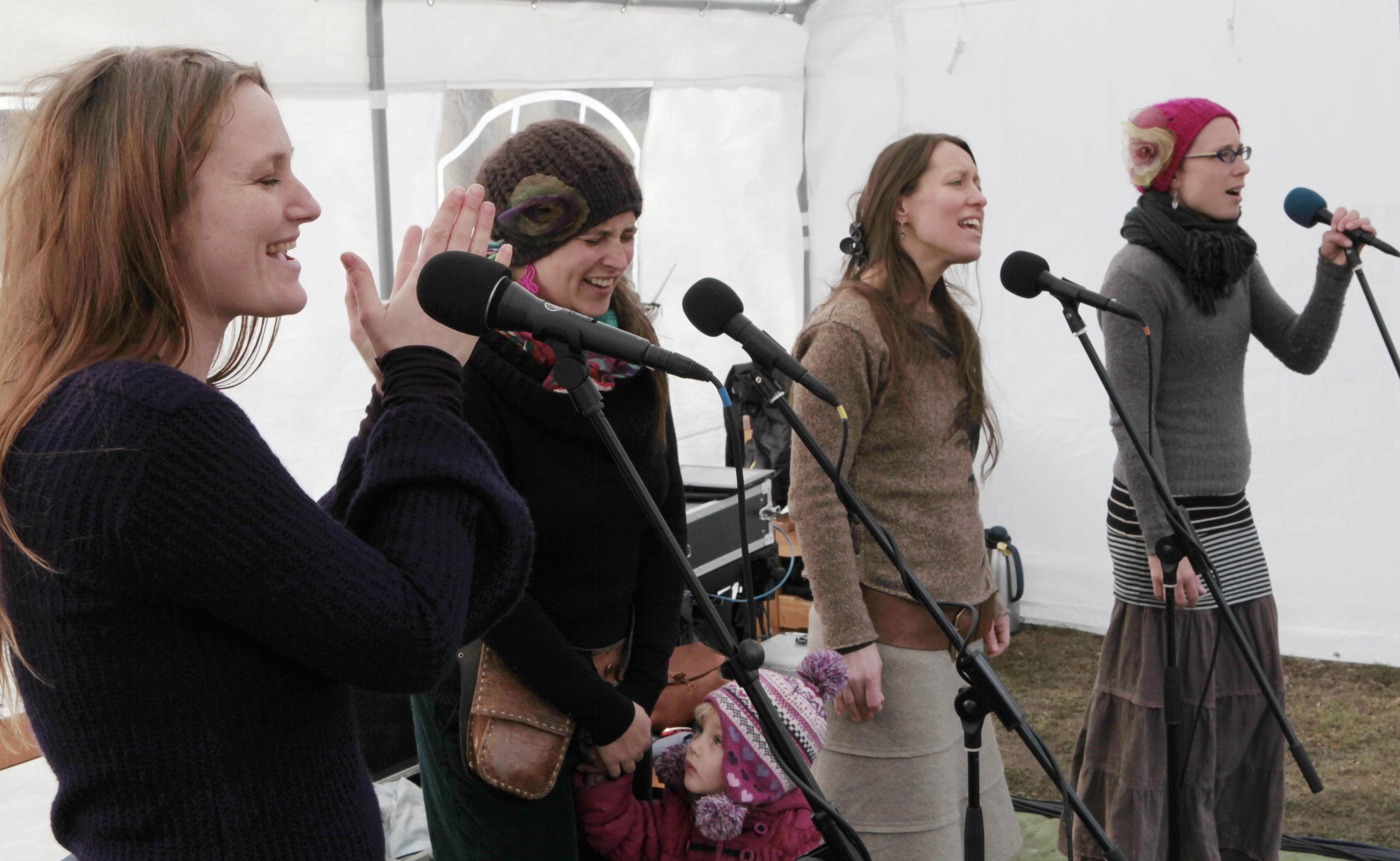 Yellow Sisters na Velikonočním jarmarku, Spolkový dům Roškotových Vlašim. Foto: Vít Švajcr